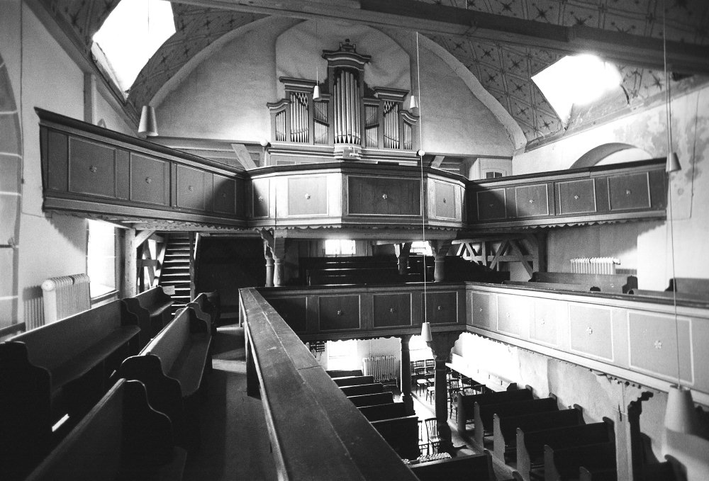 Altendorfer Kirche „St. Maria im Tale“, Nordhausen, Thüringen